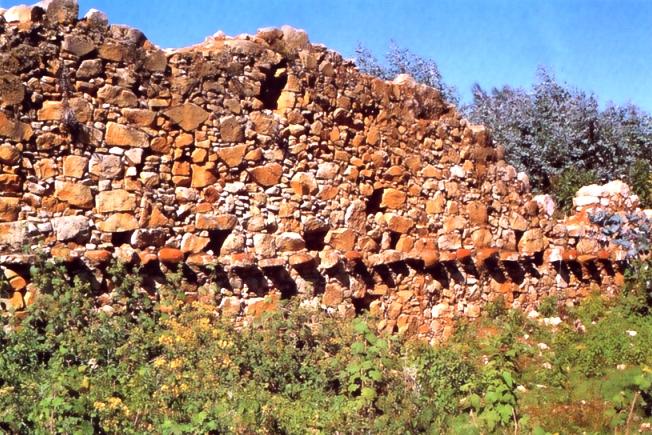 Muro de una de las edificaciones preincas de Wiracochapampa, cerca de Huamachuco, Perú. Cultura Wari.